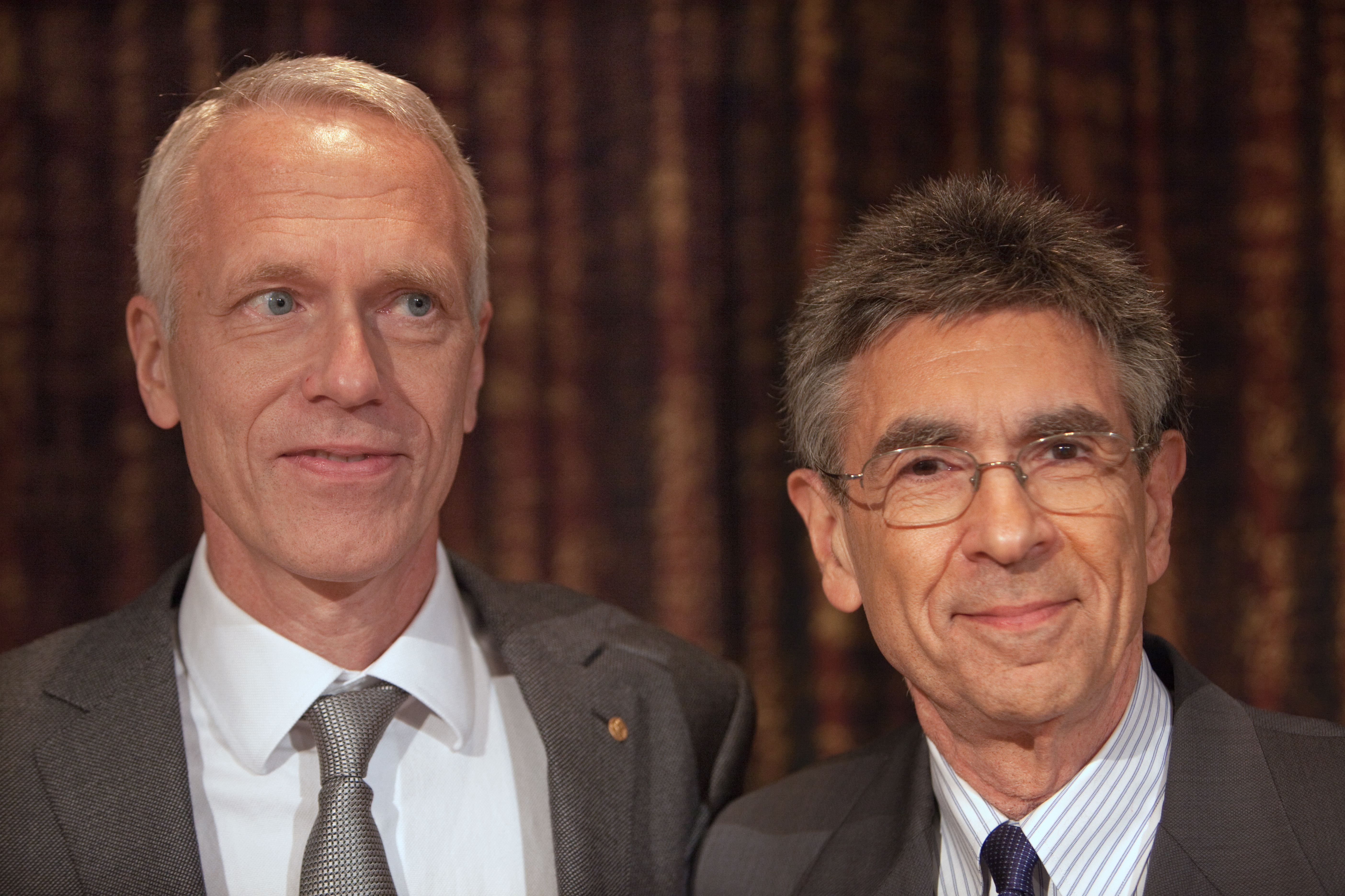 Brian Kobilka and Robert Lefkowitz, Nobel Prize winners in chemistry 2012